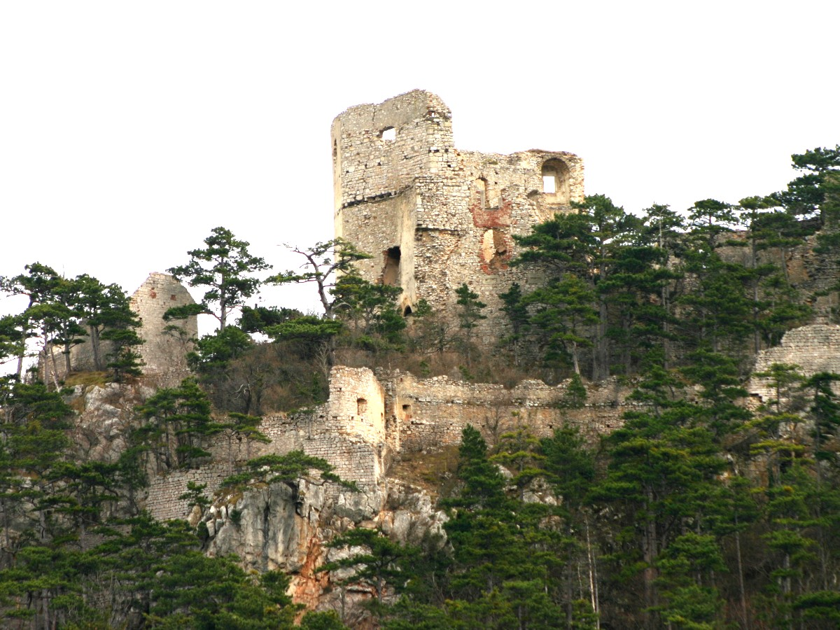 Winzendorf Burgruine Emmerberg (Bild 3)